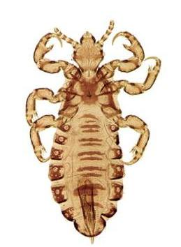 Pediculus humanus under a light microscope